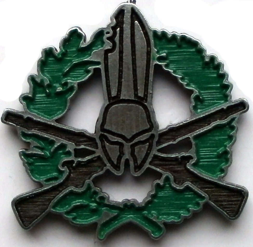 Odznaka 2kpzomt 12 BZ.